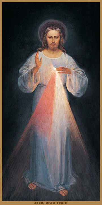 Das erste Bild vom Barmherzigen Jesus, gemalt in Anwesenheit der Heiligen Maria Faustyna Kowalska und des Seligen P. Michal Sopocko. Das Bild trägt die Unterschrift: „Jesus, ich vertraue auf Dich.“